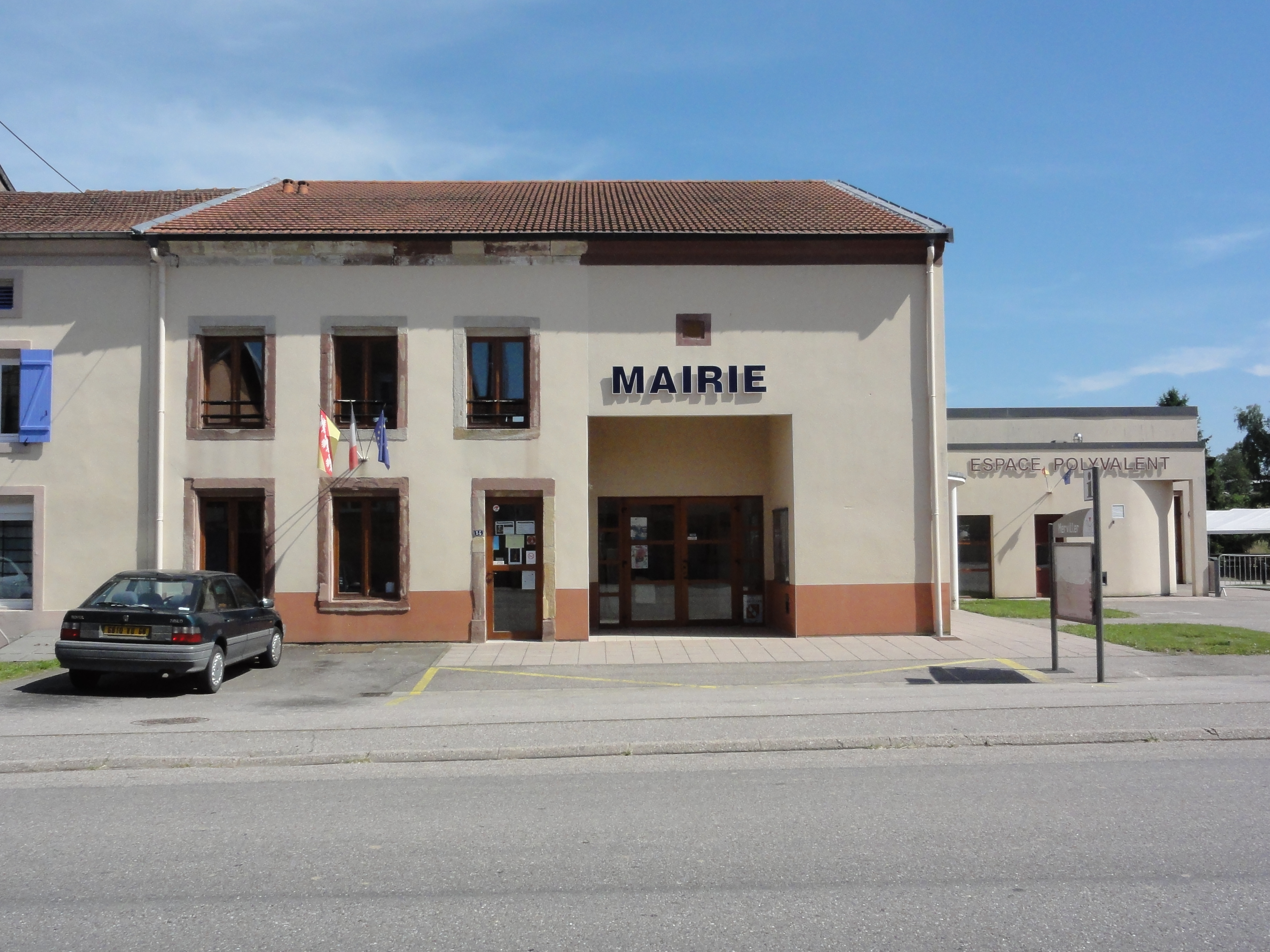 Merviller (M-et-M) mairie